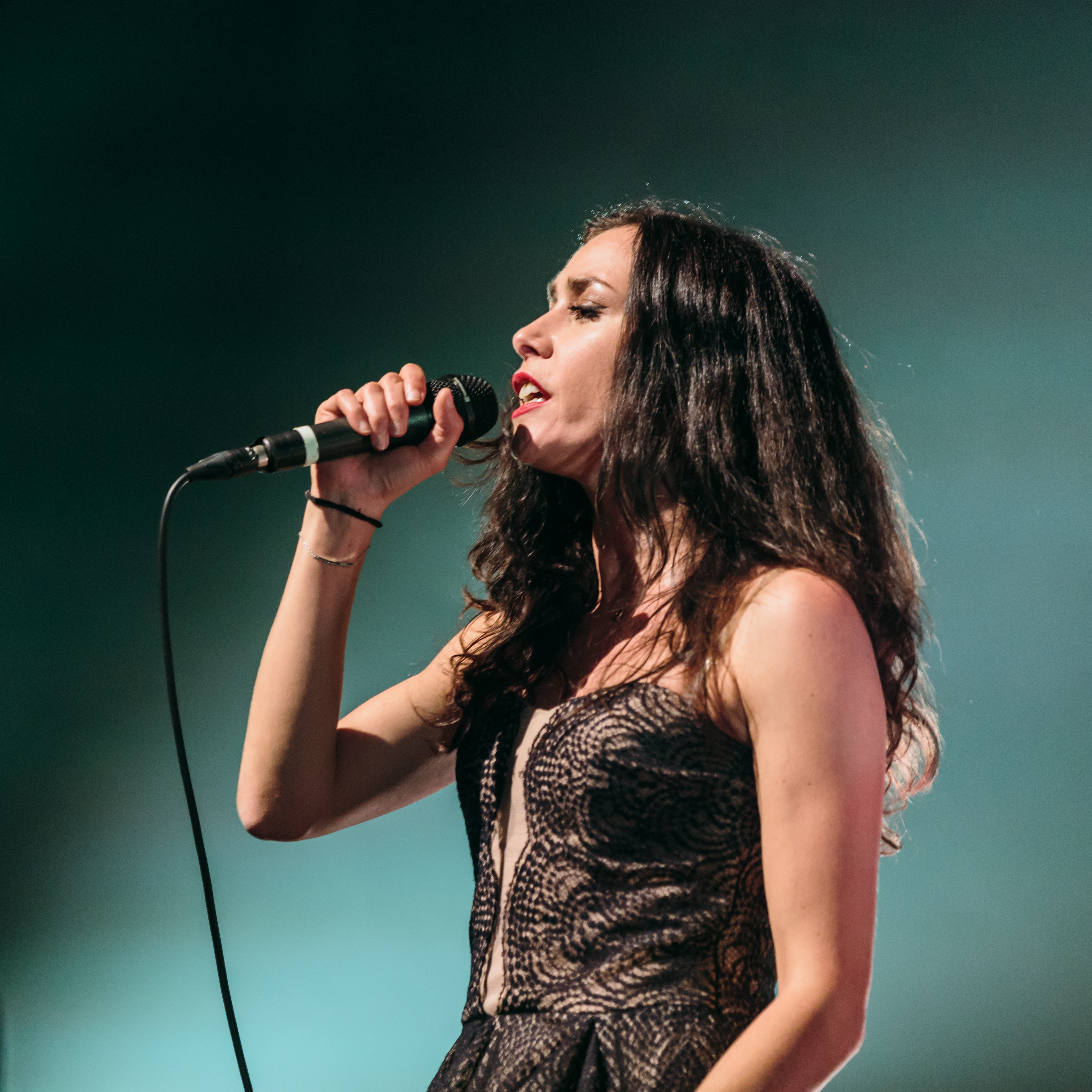 Olivia Ruiz en concert à Quimper dans le cadre du festival de Cornouaille le 21 juillet 2017.